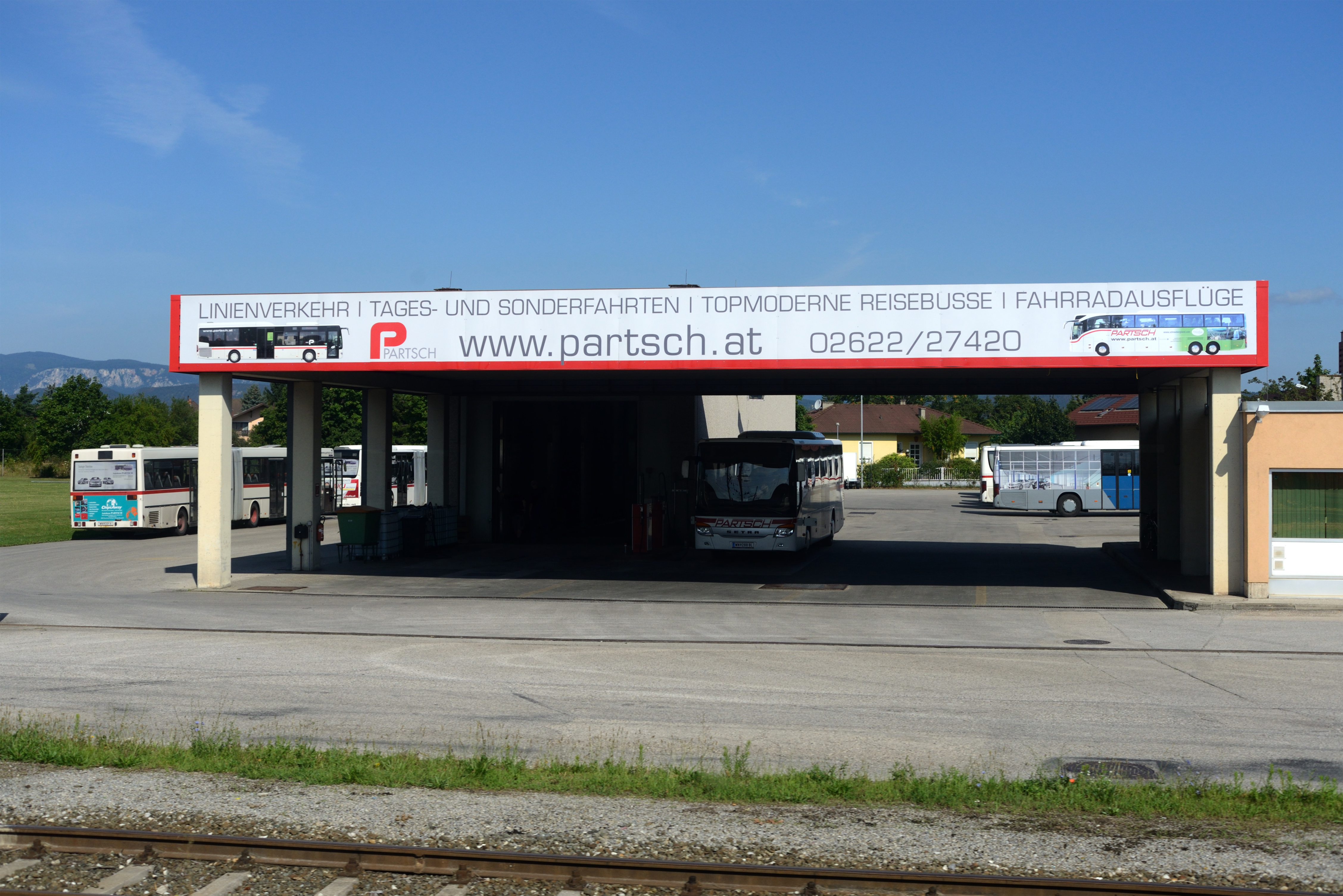 Garage des Unternehmens Partsch in Wiener Neustadt